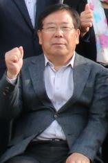 홍천소방서 북방119구급대 발대식